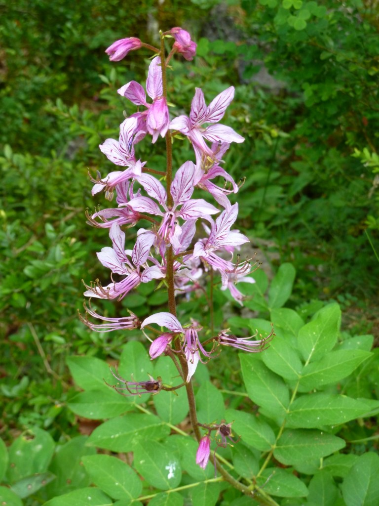 Fraxinelle au Lac de Sainte-Croix, Var